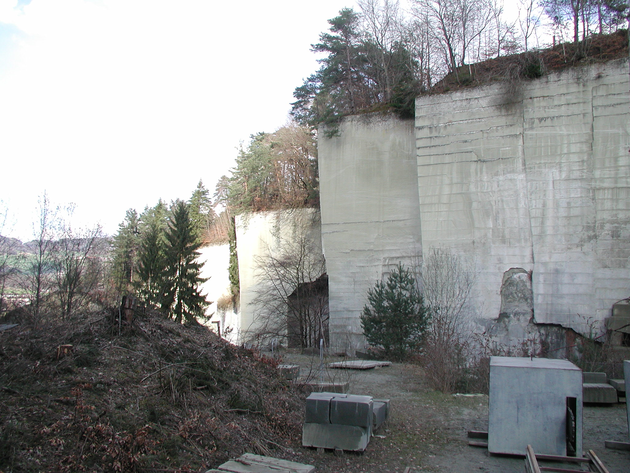 Sandsteinbrüche in Ostermundigen